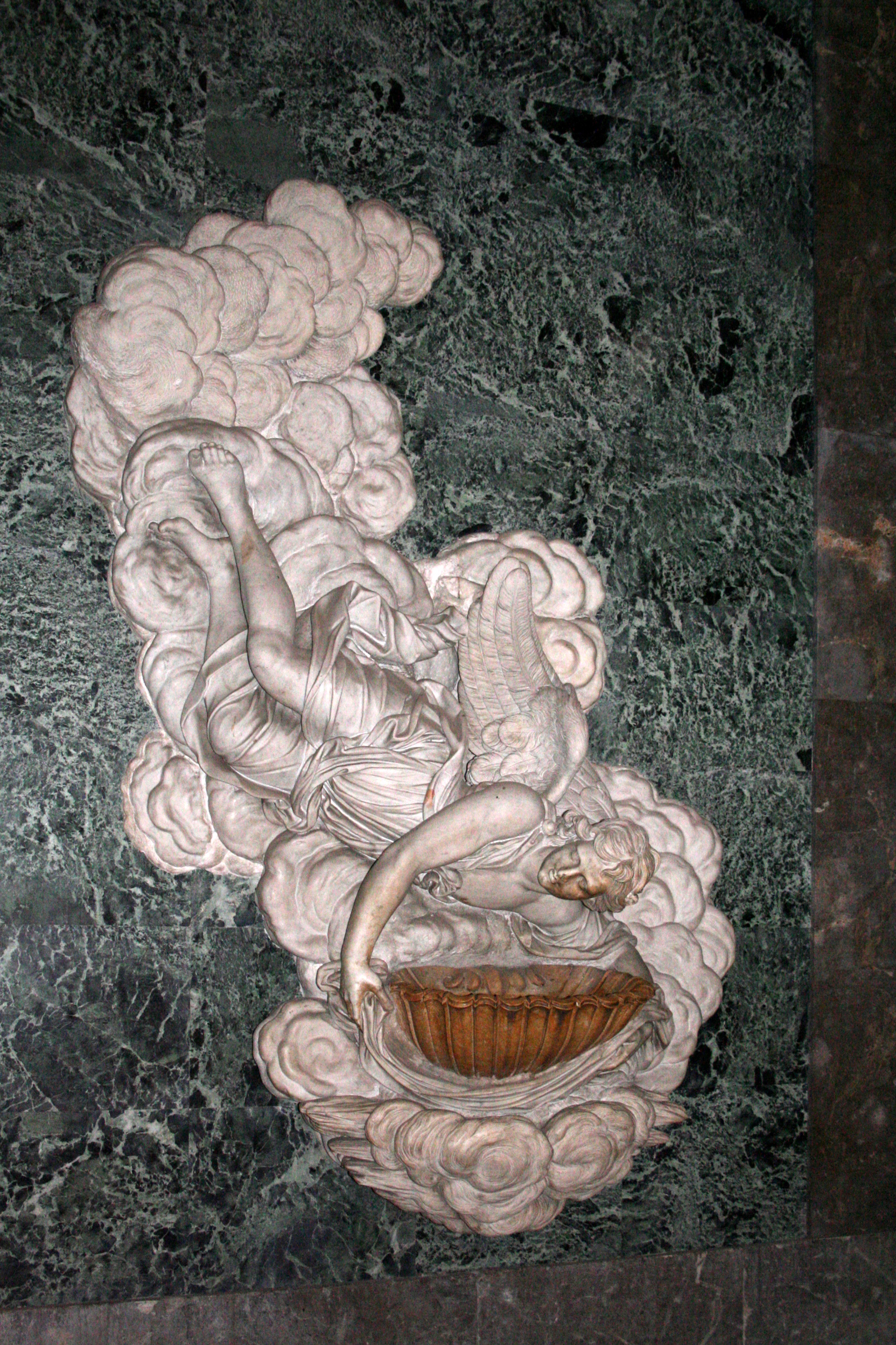 Wijwaterbekken in de San Giuseppe dei Teatini, Palermo